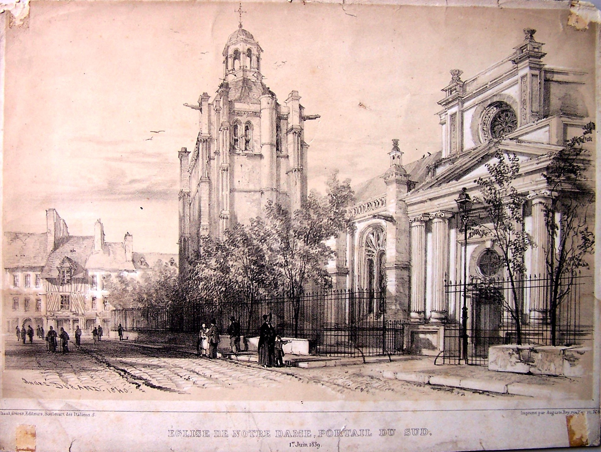 Le Havre, rue au sud de Notre-Dame. "Eglise Notre-Dame, portail du sud - 1er juin 1839 "(titre) "A droite, le portail sud de l'église Notre-Dame ; à gauche, la rue avec des passants. Au fond, la rue de Paris." (description des archives) Portail de la façade sud. On observe la présence de deux gargouilles sur la tour (qui n'existent plus aujourd'hui), et le fait que la portails était plus massivement décoré qu'aujourd'hui.